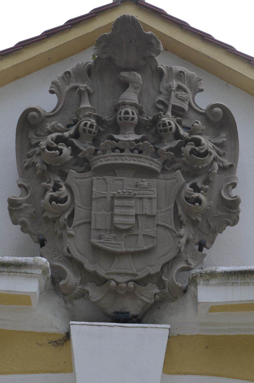 Schloss Reimlingen, Wappen des Landkomturs Franz Sigismund Friedrich Graf von Satzenhofen (reg. 1744–1748)